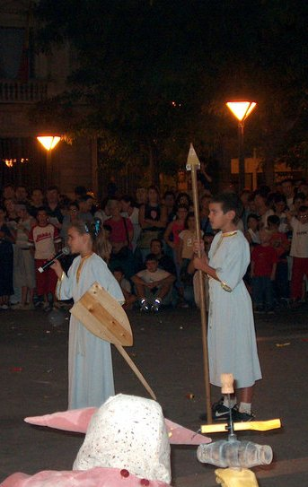 Angelets Ball de Diables de Sabadell